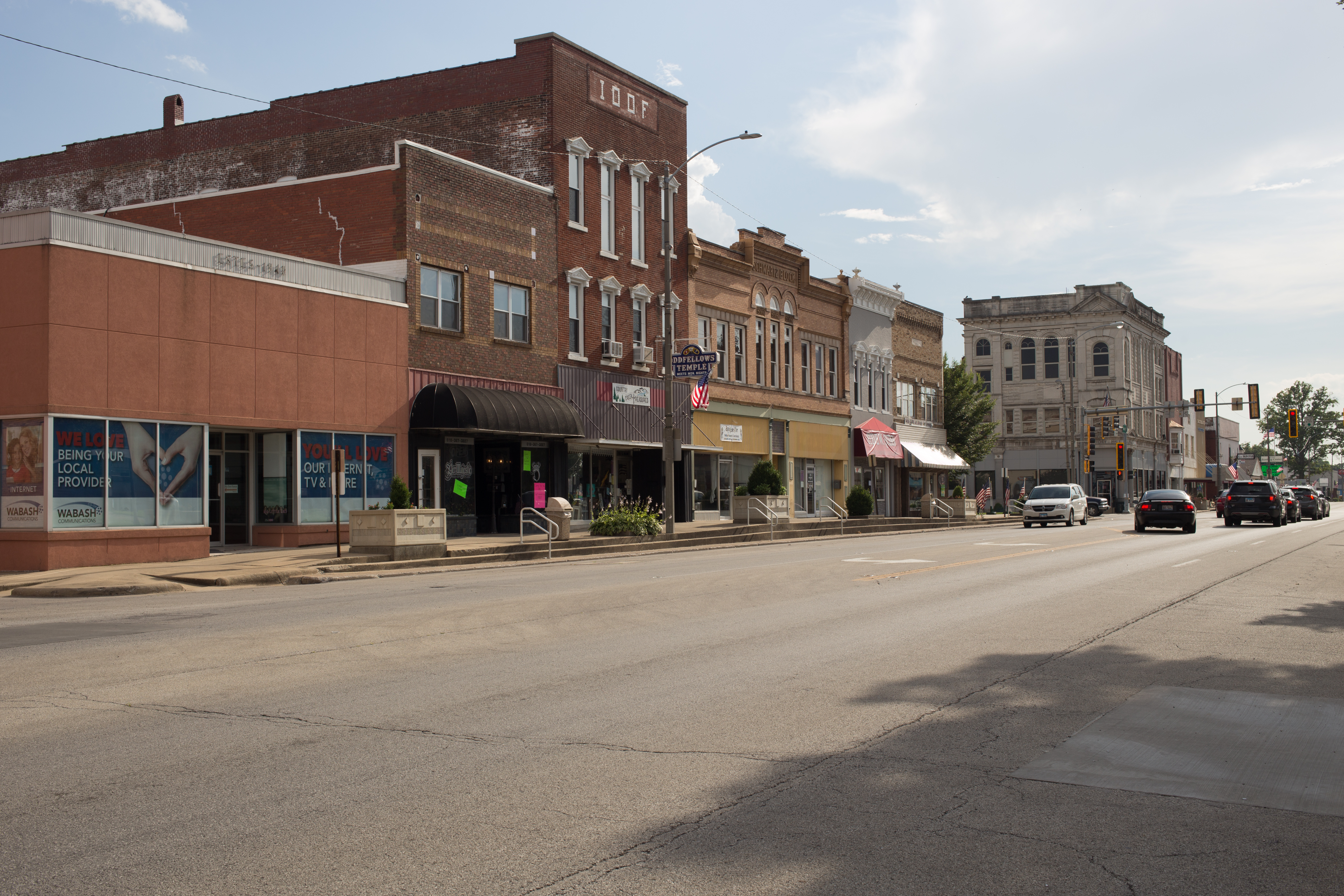 Salem, Illinois